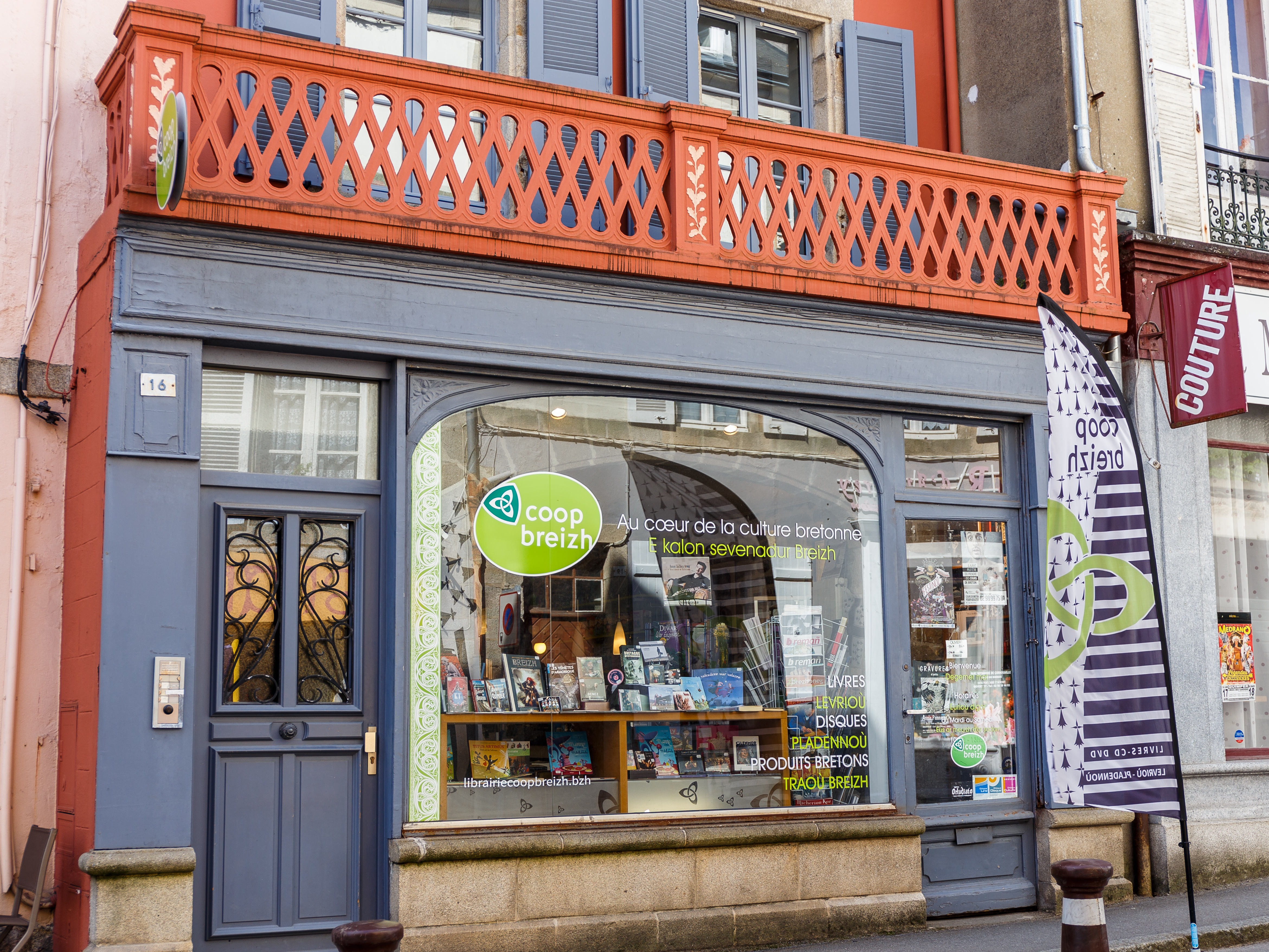 Façade du magasin Coop Breizh, enseigne de produits culturels bretons située 16 rue Élie Freron à Quimper (Finistère).